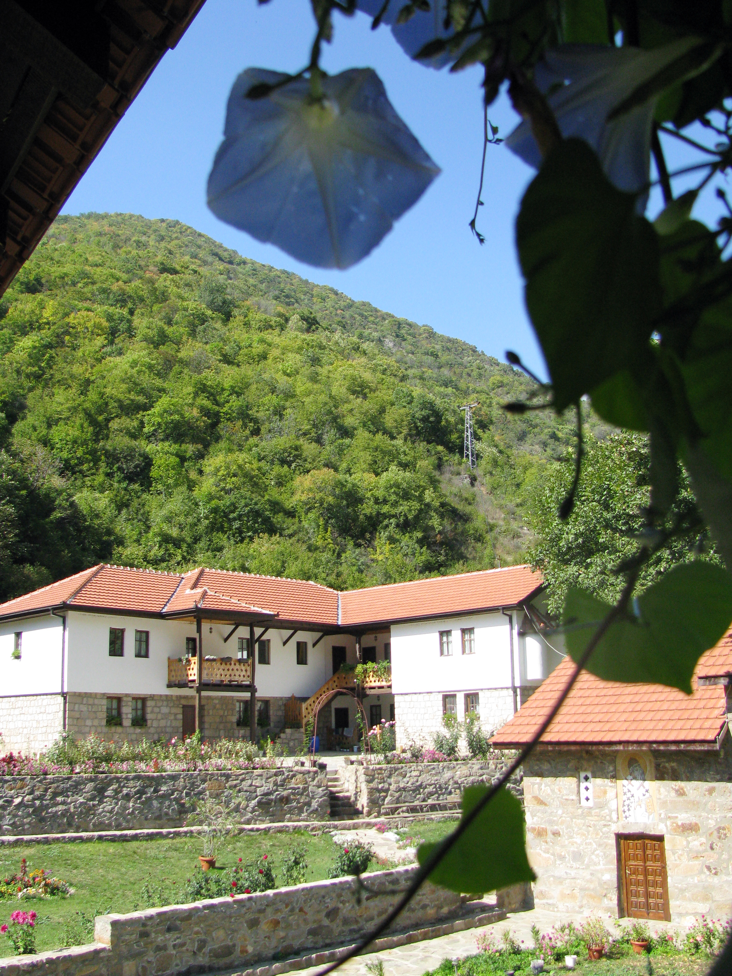 Свети Спиридон во долината на Злетовска Река